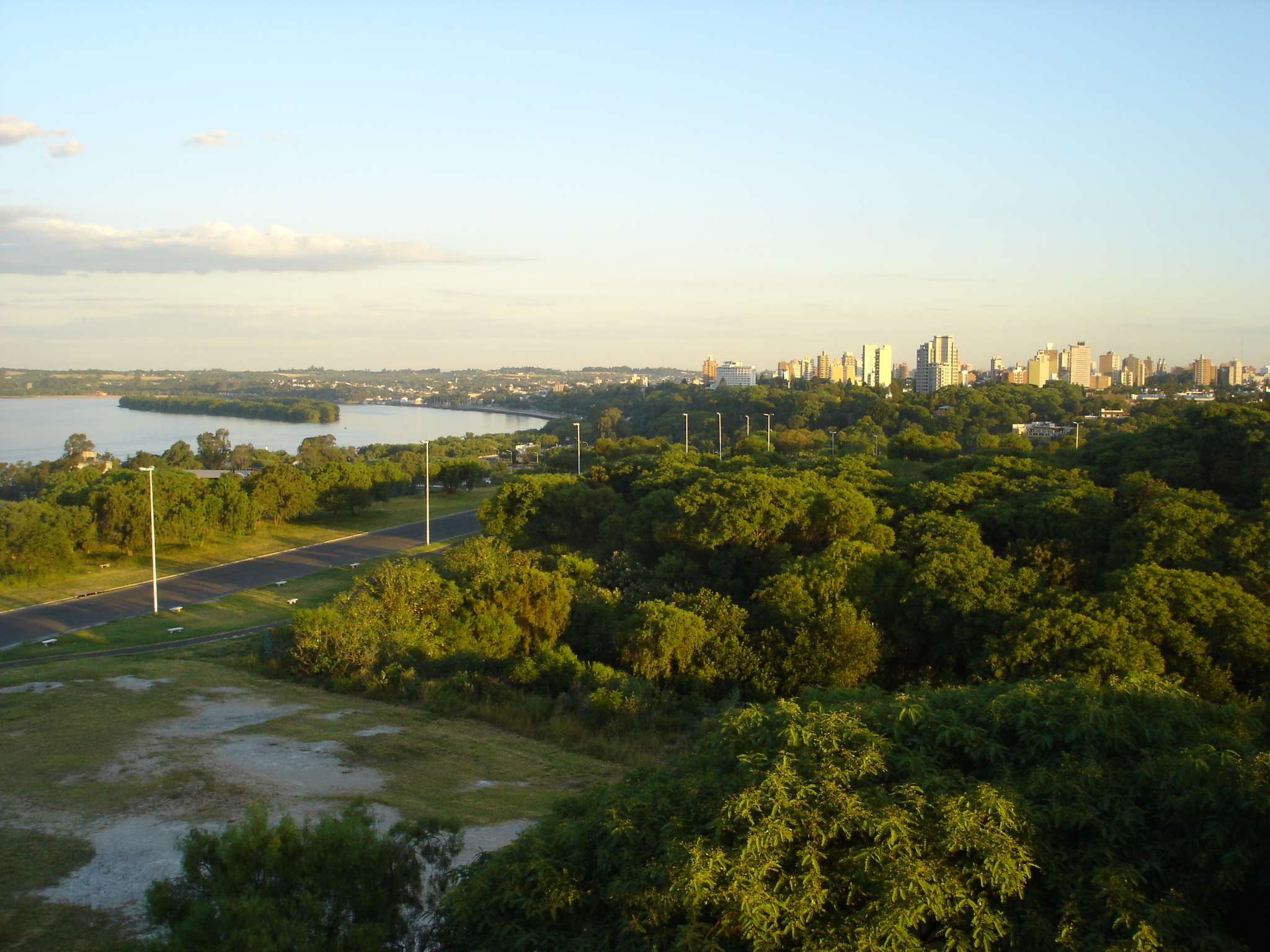 Carlos Smith, Ciudad de Paraná desde del Parque Nuevo, Diciembre 2005.